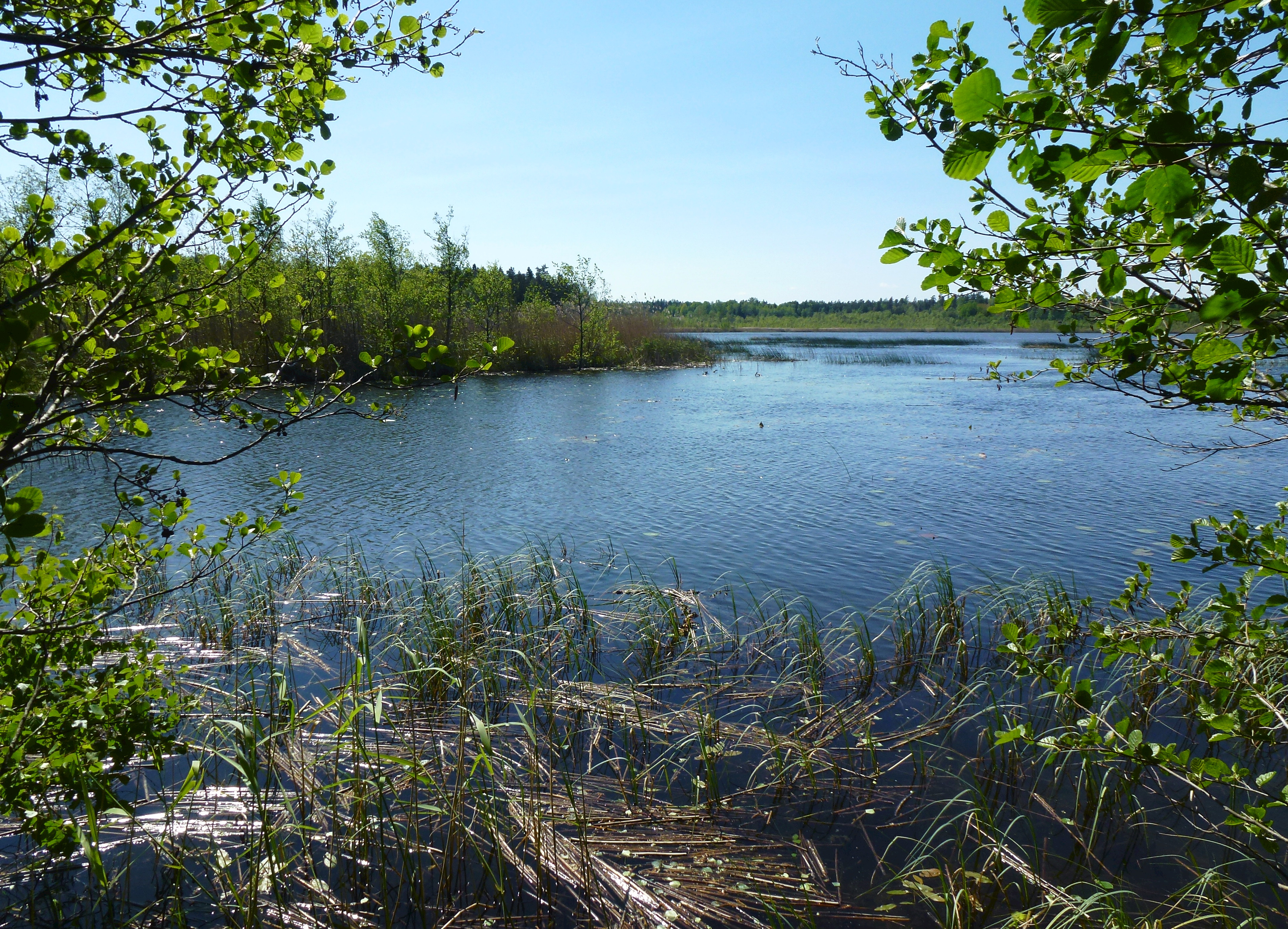 Fagersjön, Nynäshamns kommun